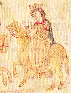 Sibyla Burgundská